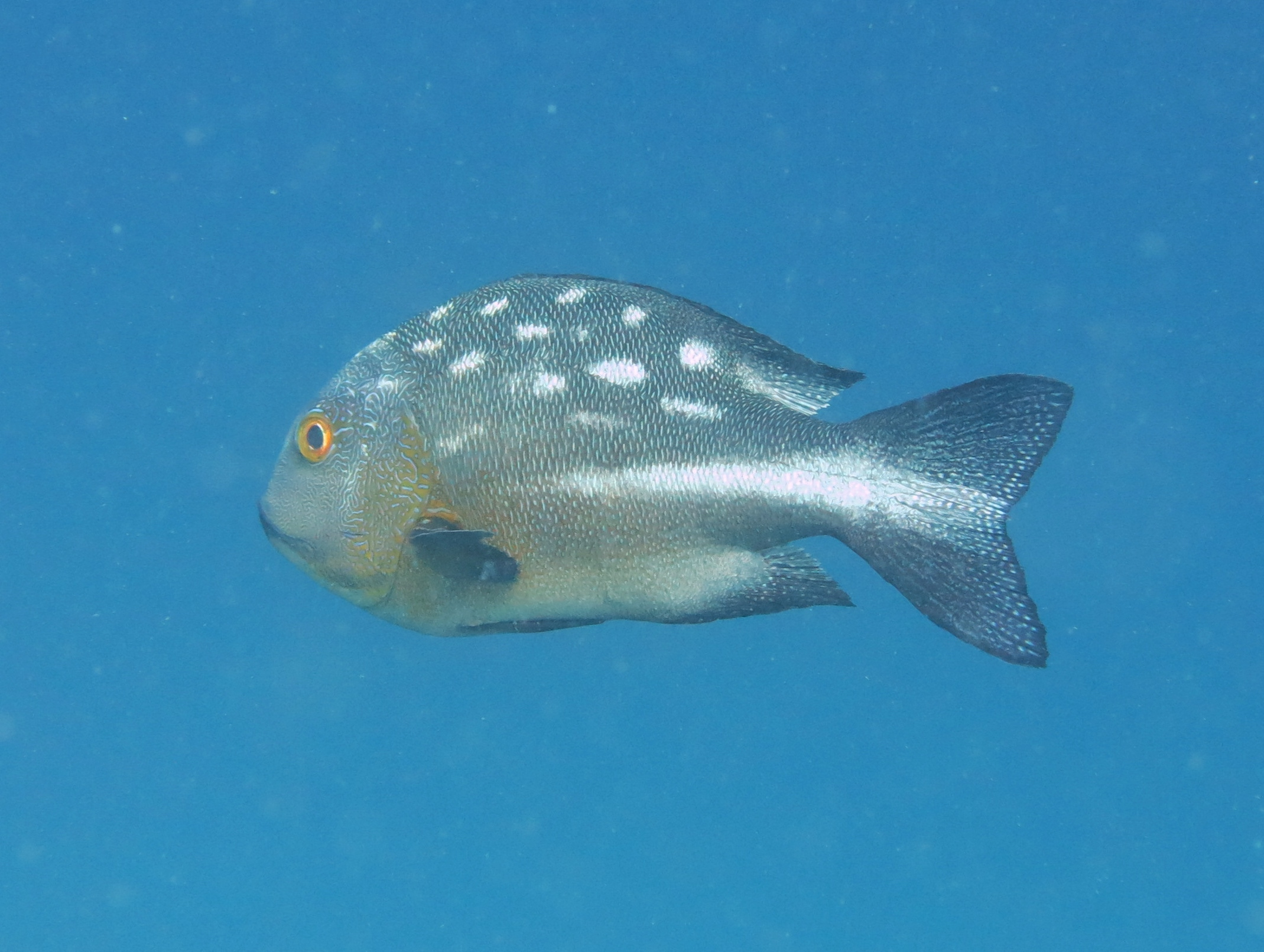 Un vivaneau minuit (Macolor macularis) aux Maldives (Landaagiraavaru, atoll de Baa).